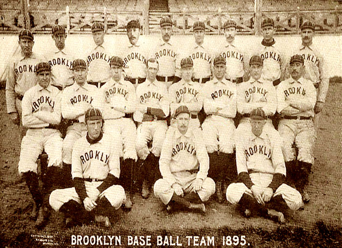 1895 Brooklyn Grooms